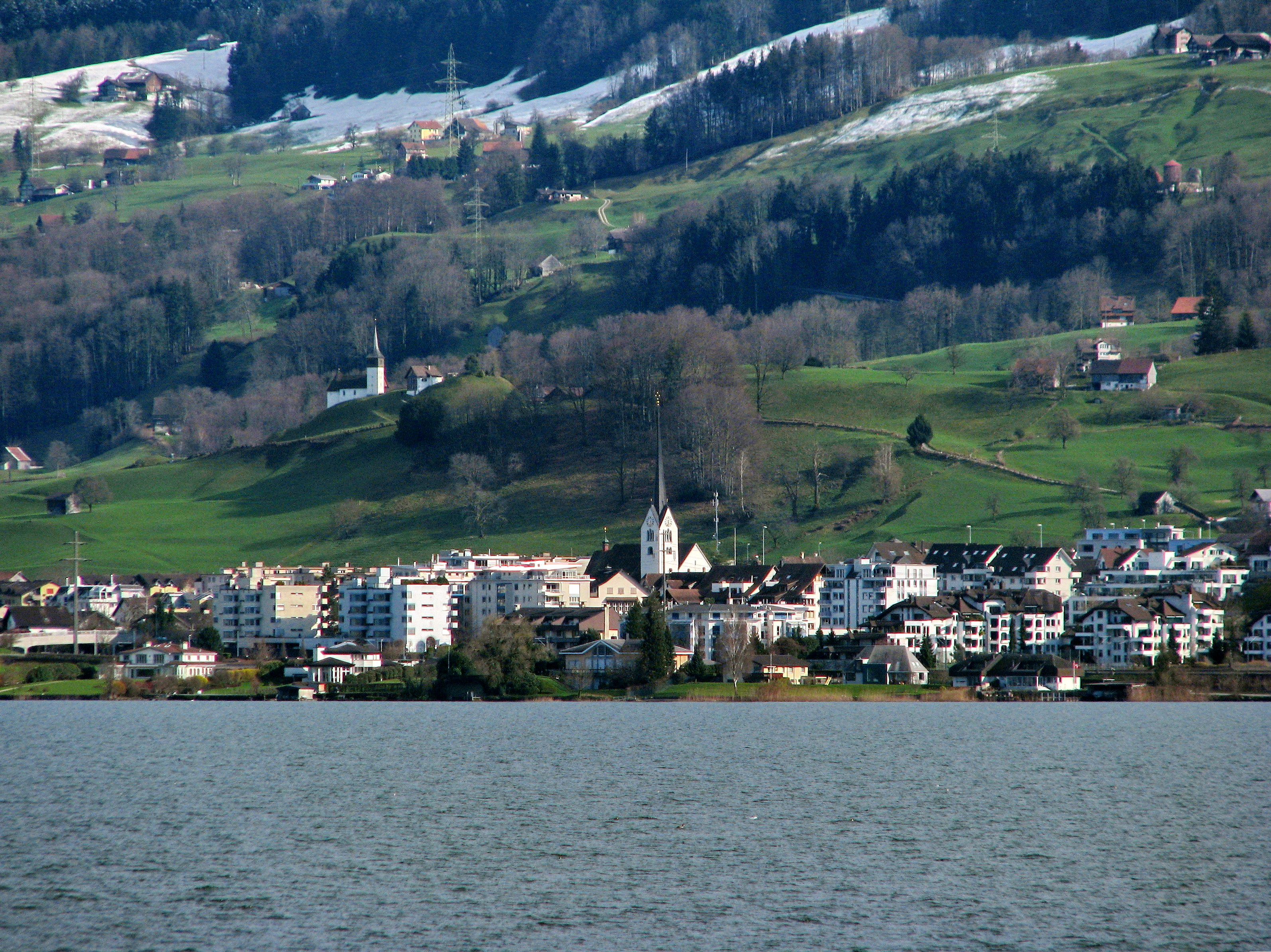 Obersee (upper Lake Zürich), as seen from Hurden, Altendorf (SZ) in the background.